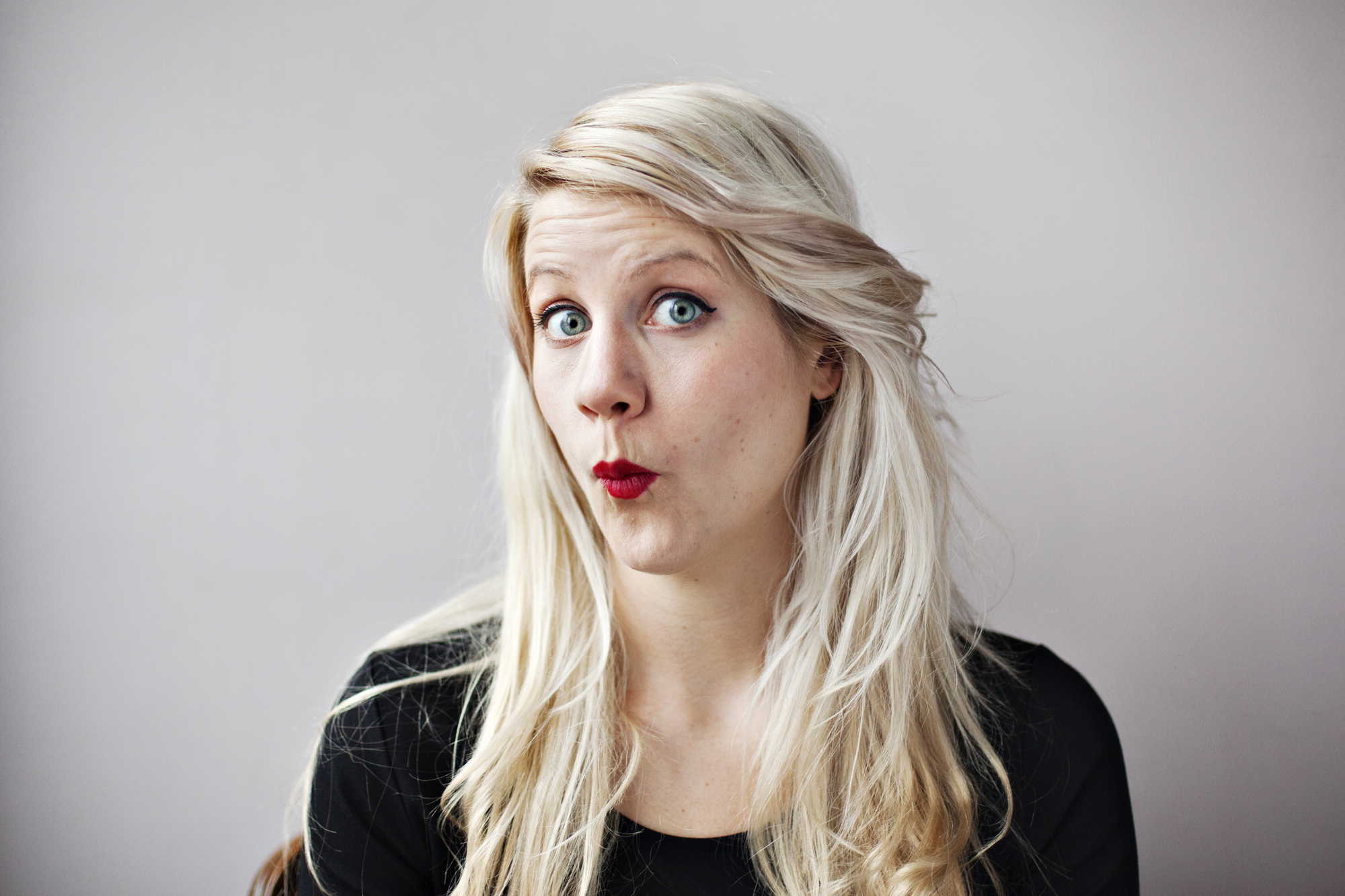 Radioprogramledaren Emma Knyckare.